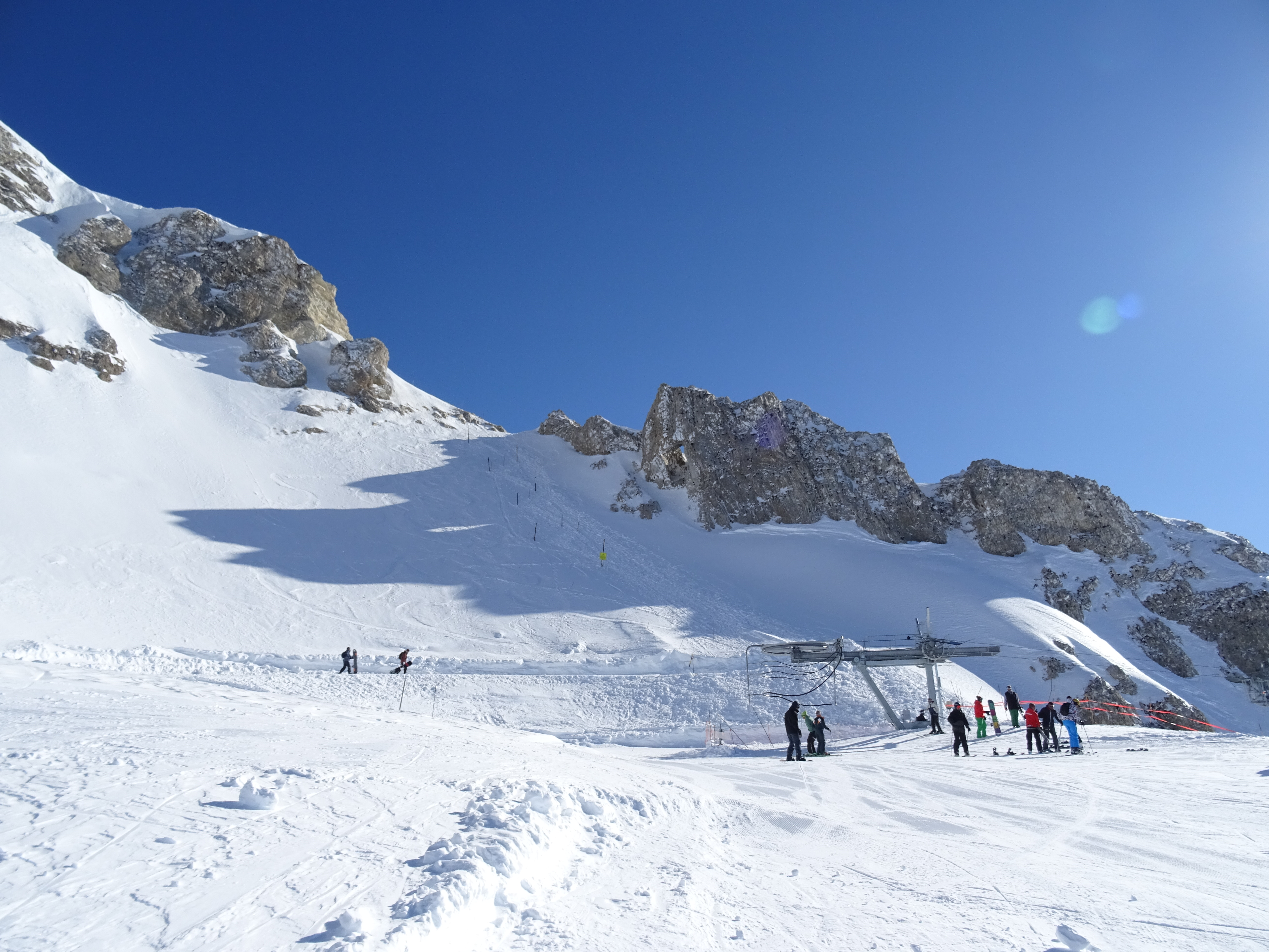 Haut du TSK du Pierra (nouvelle poulie de retour de 2019), domaine skiable du Dévoluy, et nouveau chemin sécurisé vers le plateau de Bure